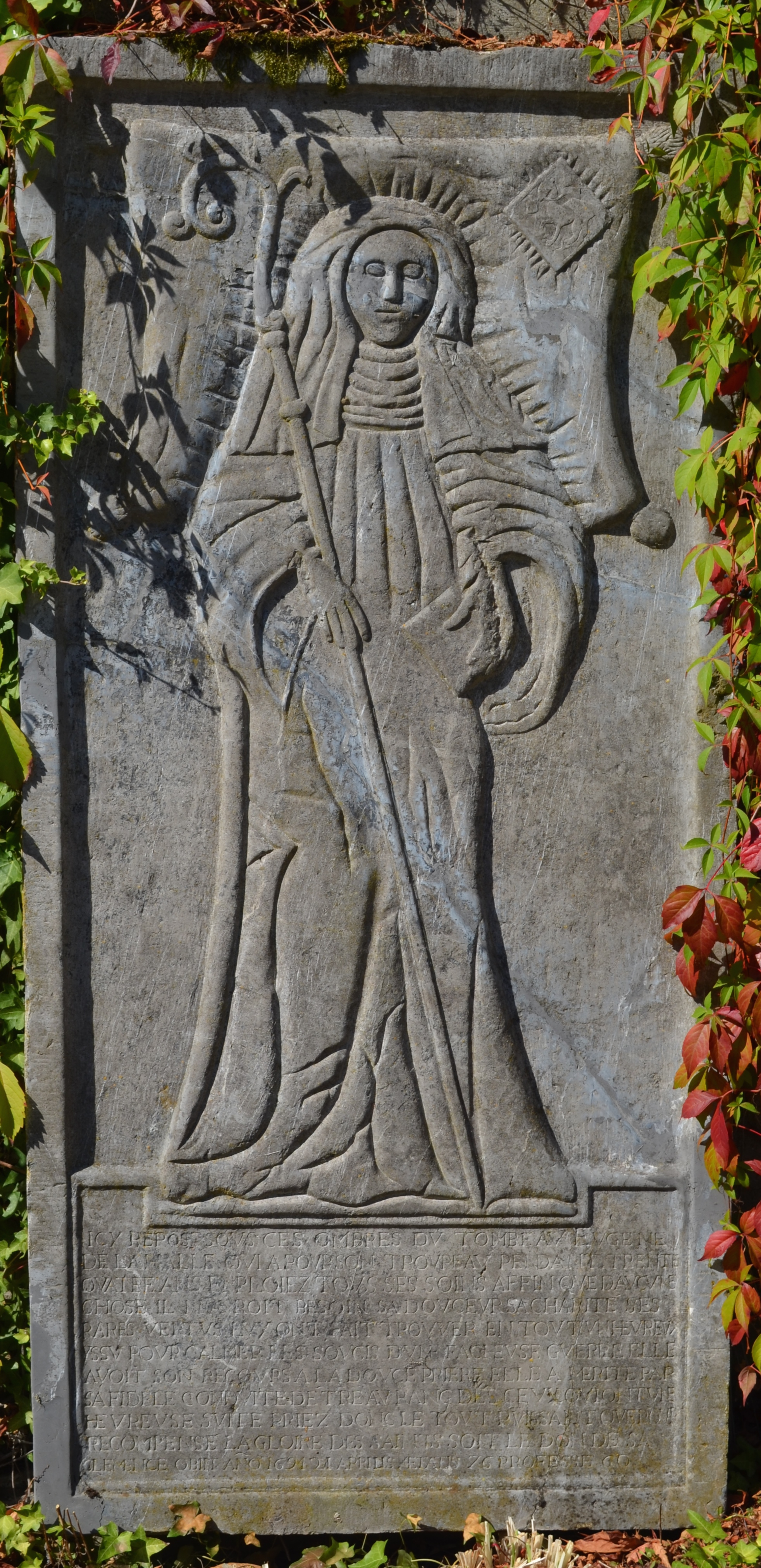 Abbaye Notre-Dame de Soleilmont - dalle funéraire de l'abbesse Eugénie de la Halle. Ici repose sous ces ombres du tombeau Eugénie de la Halle qui a pour son troupeau Pendant trente quatre ans emploiez tous ses soins Affin que d'aucune chose il n'avroit besoin Sa douceur sa charité ses rares vertus Luy ont fait trouver en tout un heureux yssu Pour clarmer les soucis d'une facheuse guerre Elle avoit son recours a la douce prière Elle a mérité par sa fidèle conduite D'être au rang de ceux qui ont une heureuse suite Priez donc le tout puisant que pour recompense La gloire des Saints soit le don de sa clemence Obiit ano 1694 21 aprilis œtatis 76 professe 60.